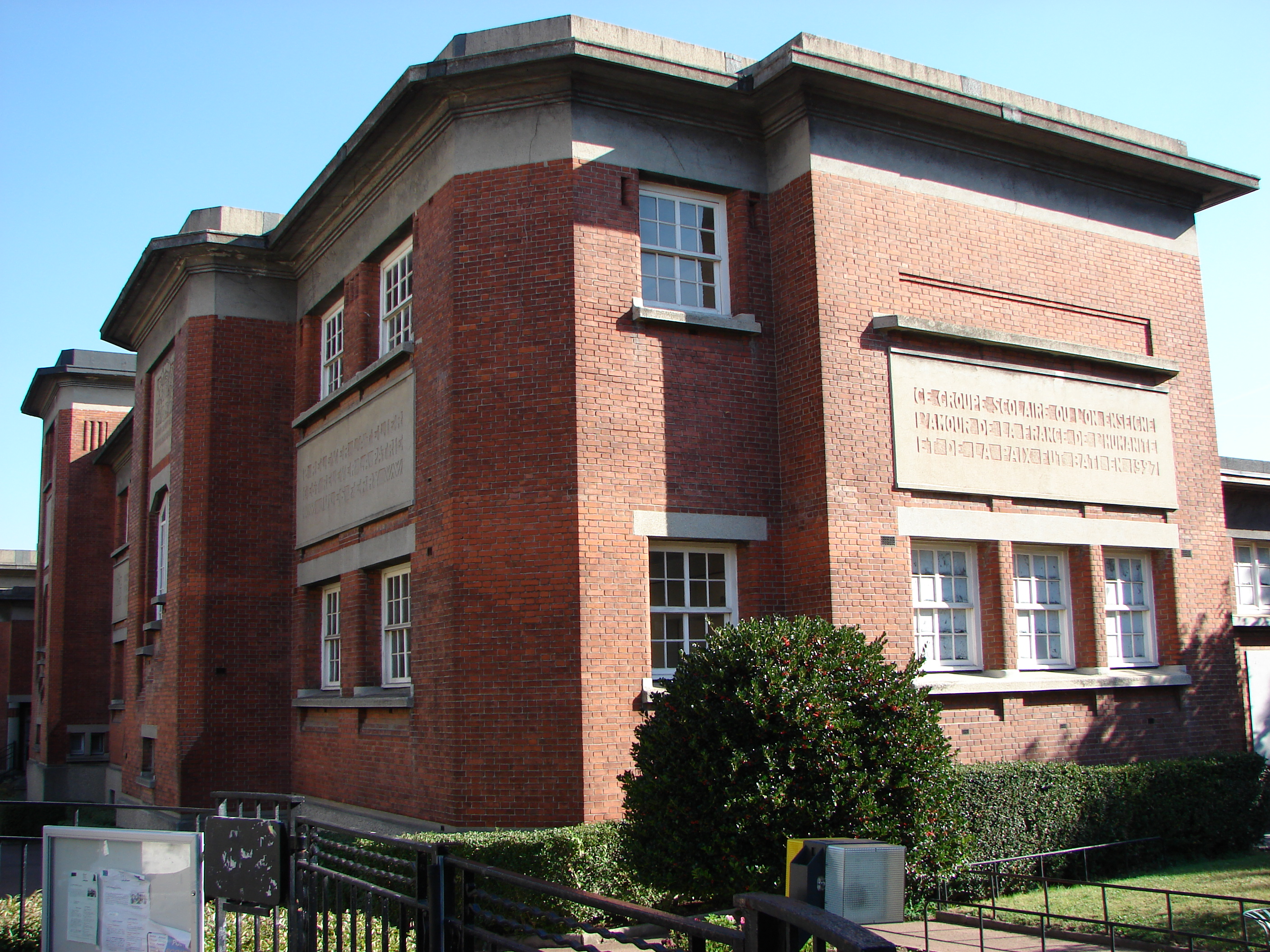 Lycée Paul-Langevin (Suresnes) (aile gauche de l'entrée principale)